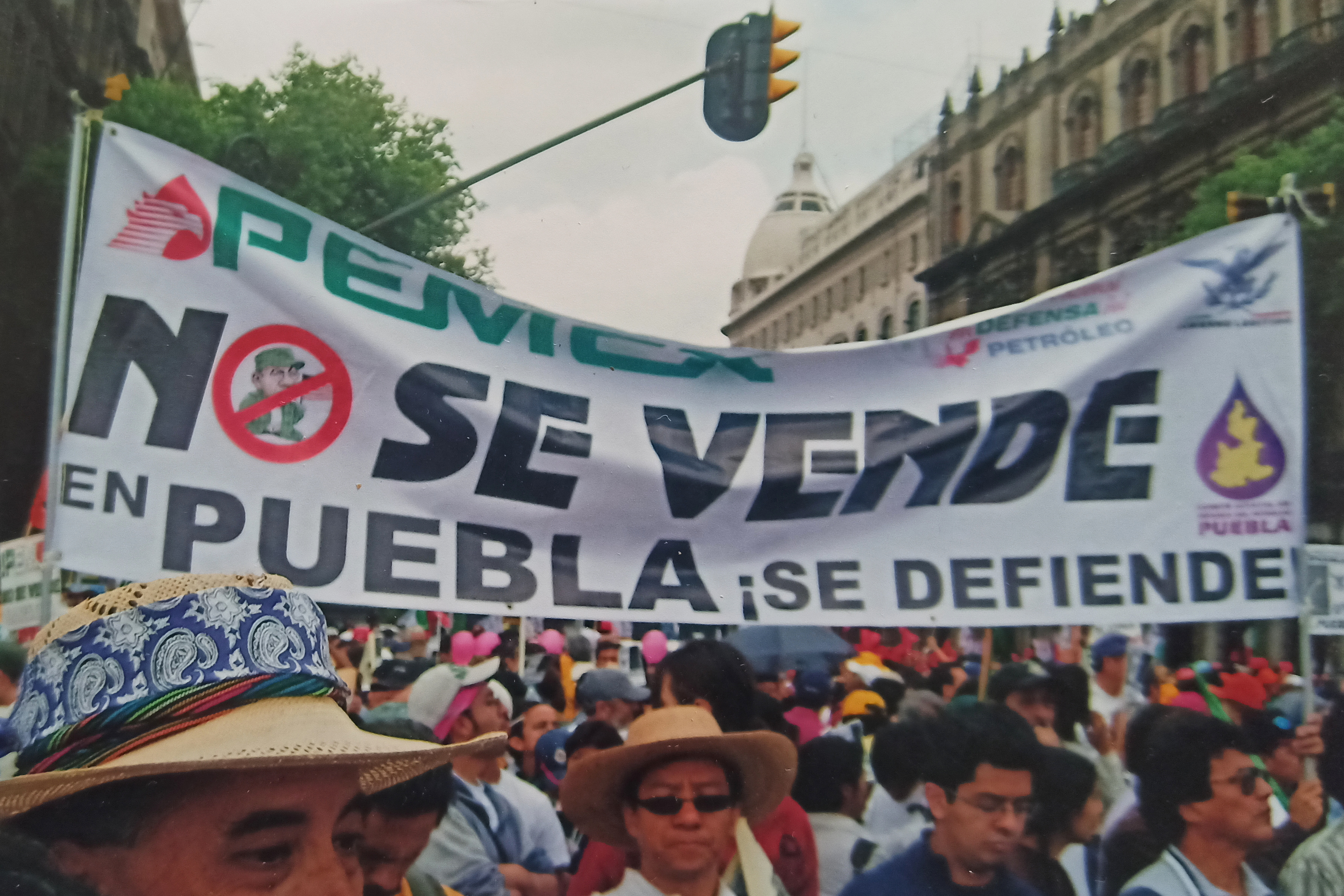 Protesta contra reforma energética de Felipe Calderón - Ciudad de México, 2008.